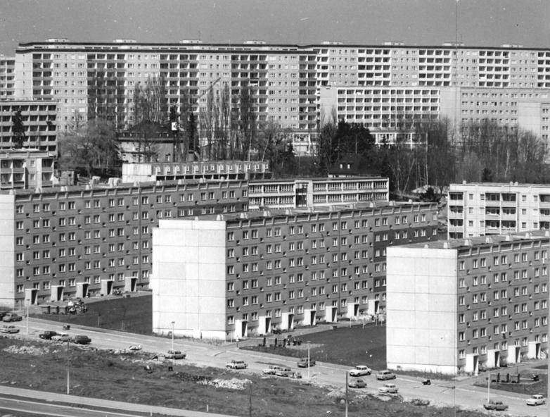 Chemnitz, Neubaugebiet "Fritz Heckert", Wohnblocks